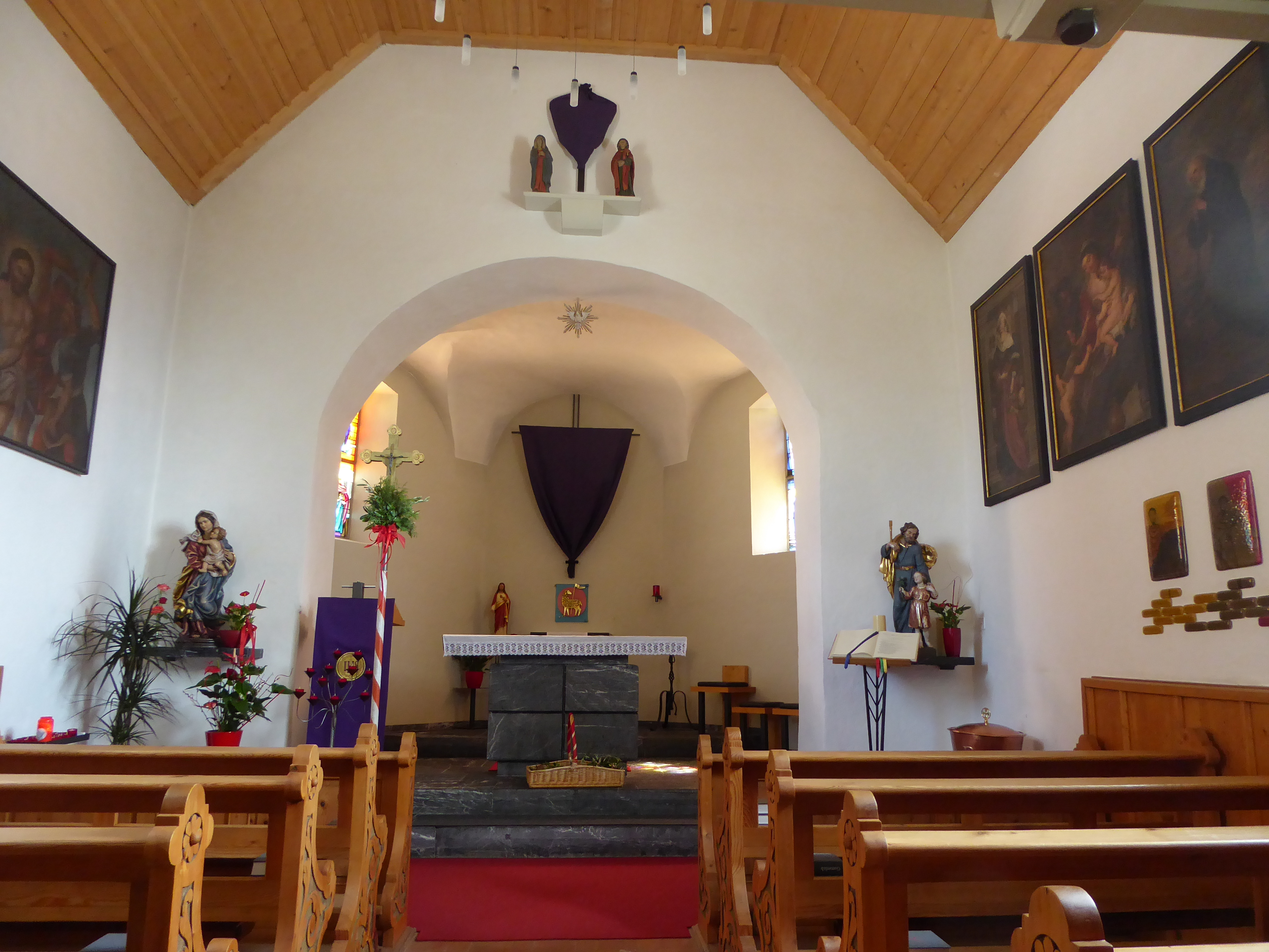 Kapelle Planken FL, Chor